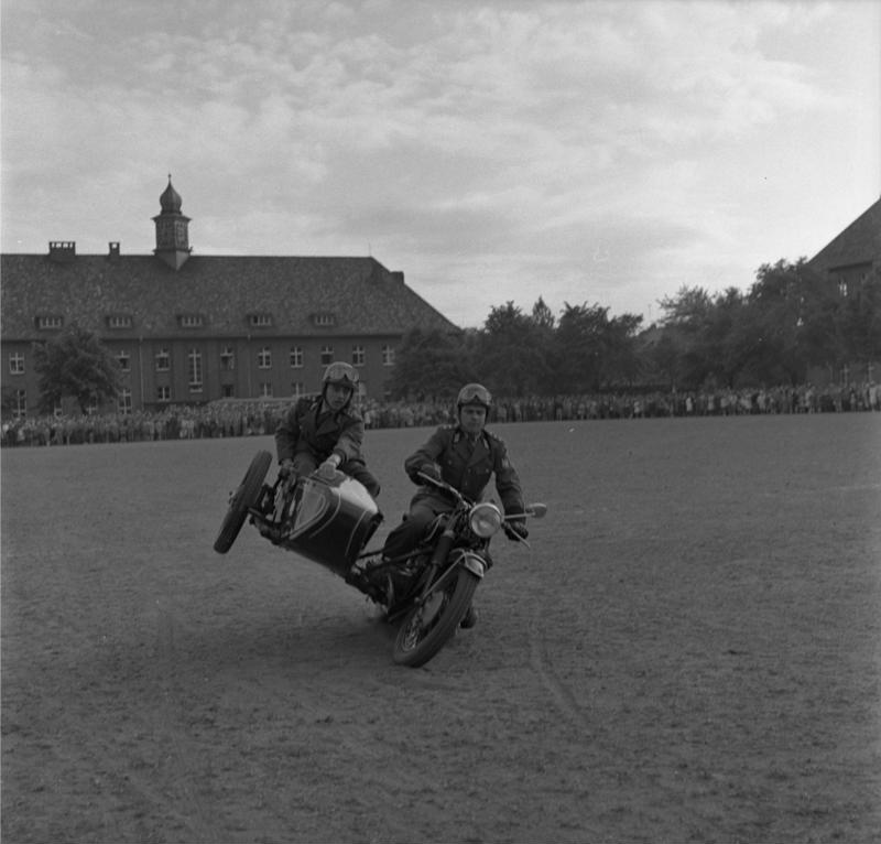 10 jähriges Bestehen des BGS: Vorführung einer Motorradstaffel in der Pionierkaserne Lübeck